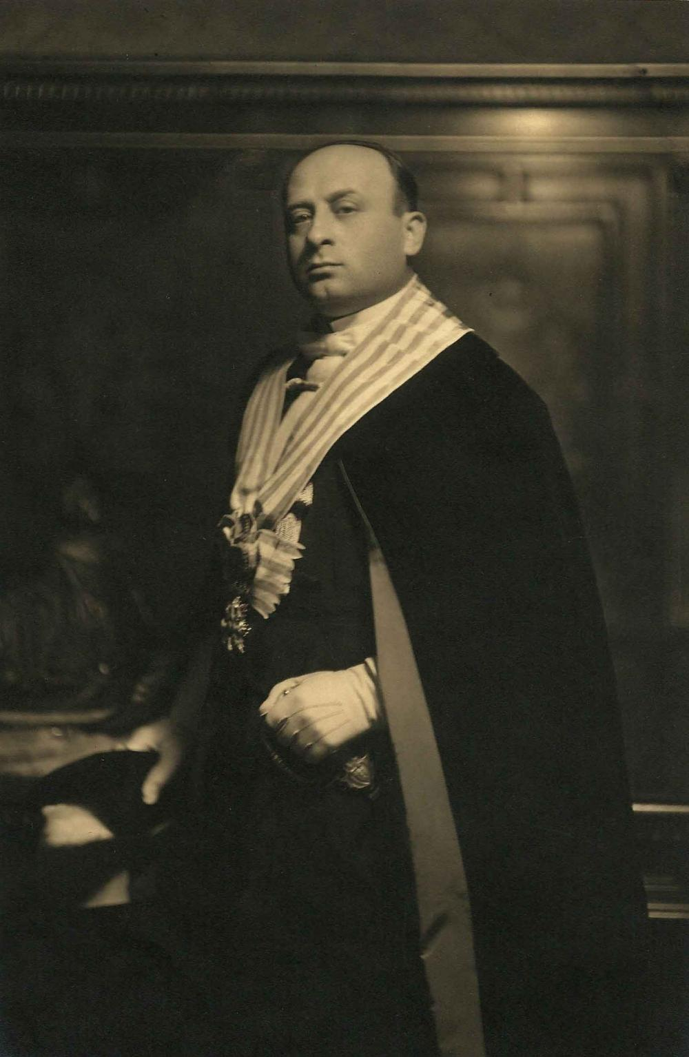 Immagine uficiale di Giuliano Gozi da Capitano Reggente nel 1932